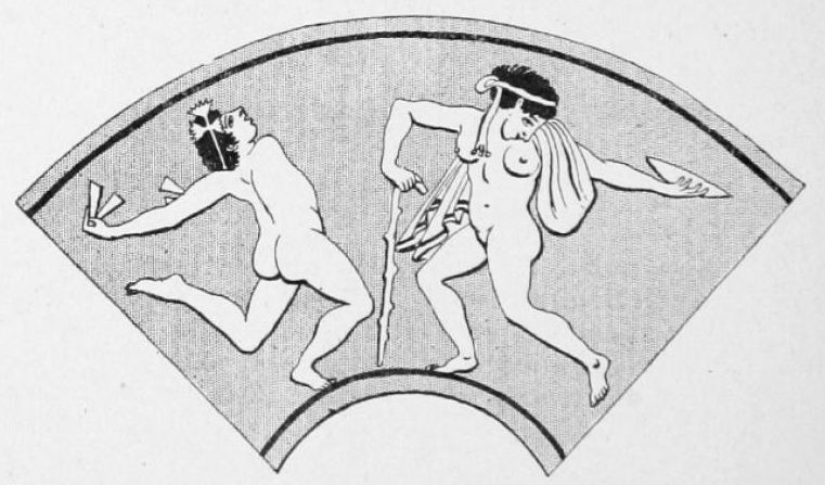 Danse dionysiaque. D'apres une coupe antique.